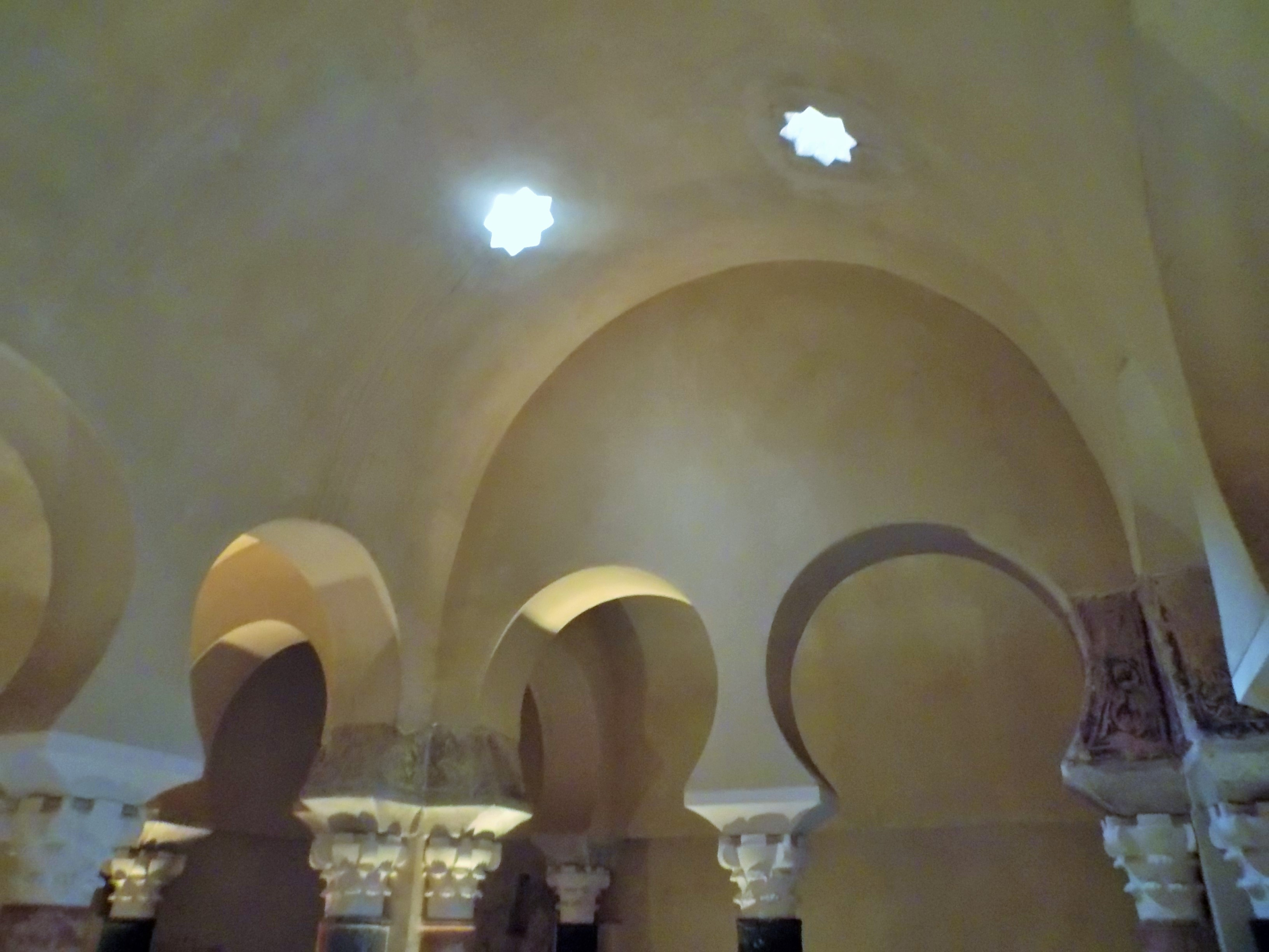 Baños califales de Córdoba : techo y huecos de ventilación en las sales frias y templadas.